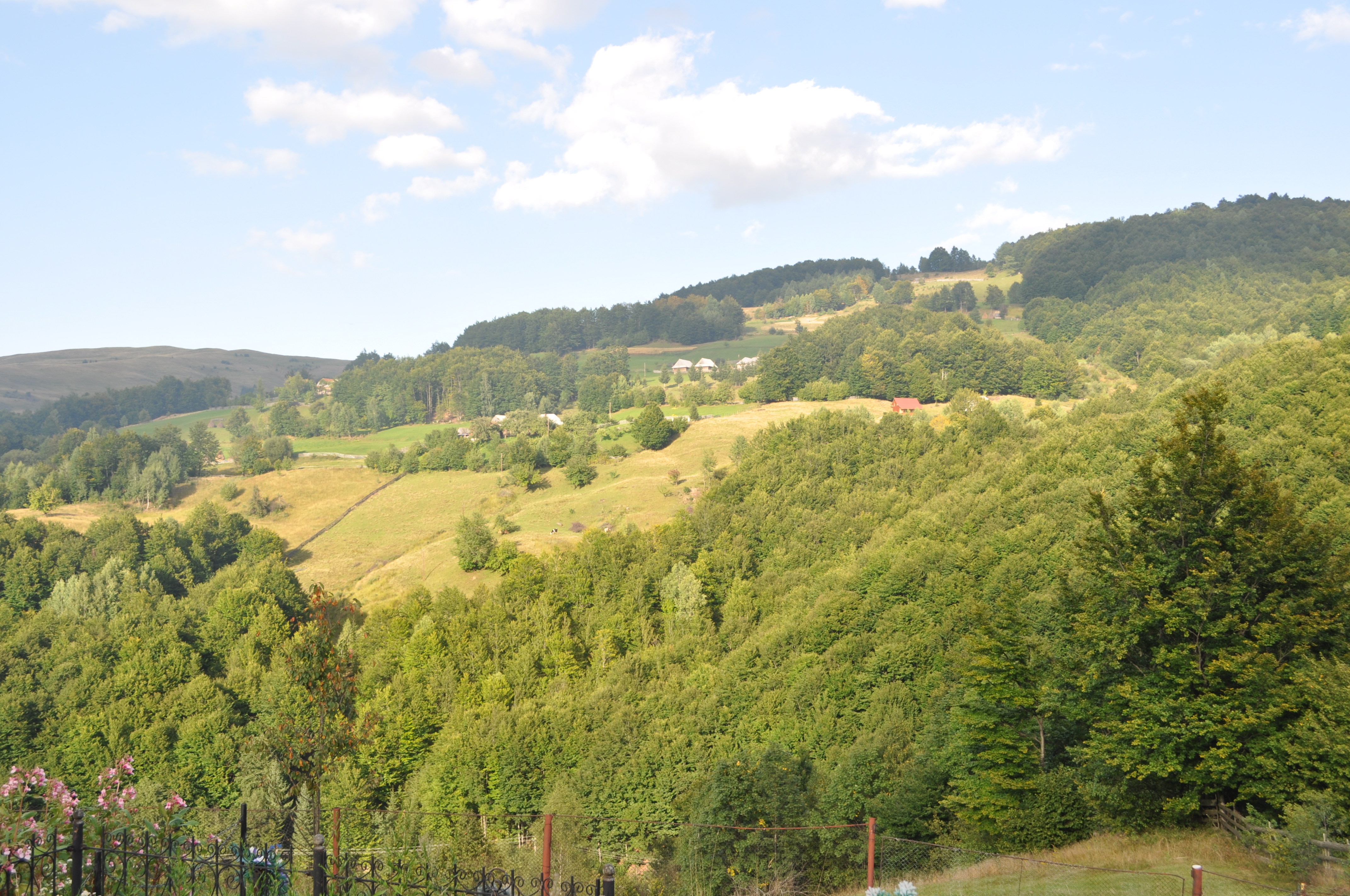 Răchițele, județul Cluj